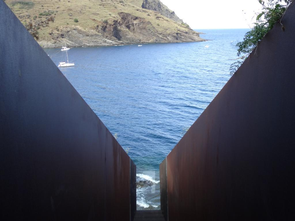 Pasajes es el nombre del Memorial que el artista israelita Dani Karavan realizó en Portbou en homenaje a Walter Benjamin, con motivo del 50 aniversario de su muerte. Financiado por el Gobierno de la Generalitat de Catalunya y el Gobierno de la República Federal de Alemania, fue inaugurado el 15 de mayo de 1994.